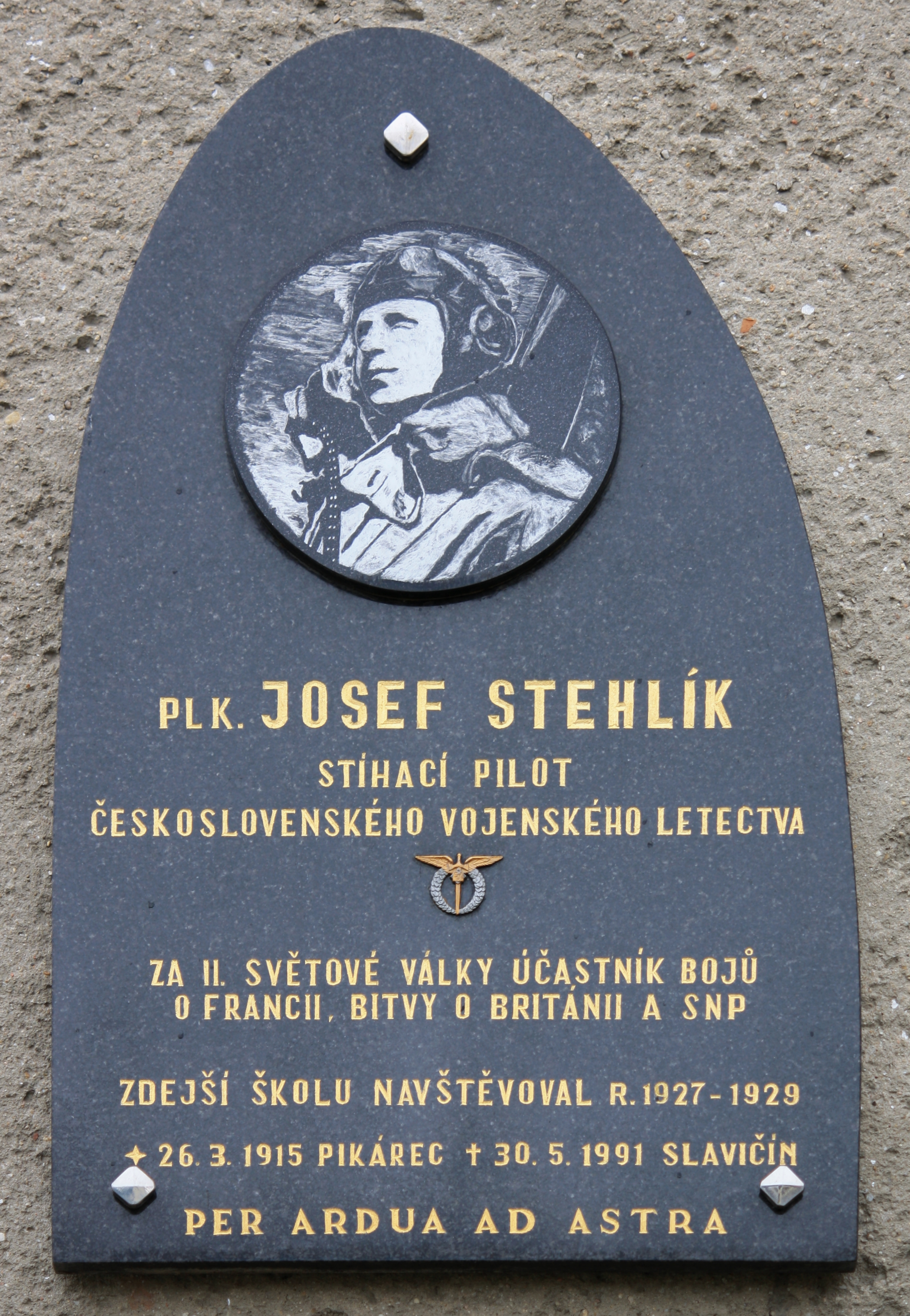 Strážek - pamětní deska pilota RAF Josefa Stehlíka na budově školy This photograph was taken within the scope of the 'Czech Municipalities Photographs' grant. This photograph was taken with a DSLR from WMCZ's Camera grant.